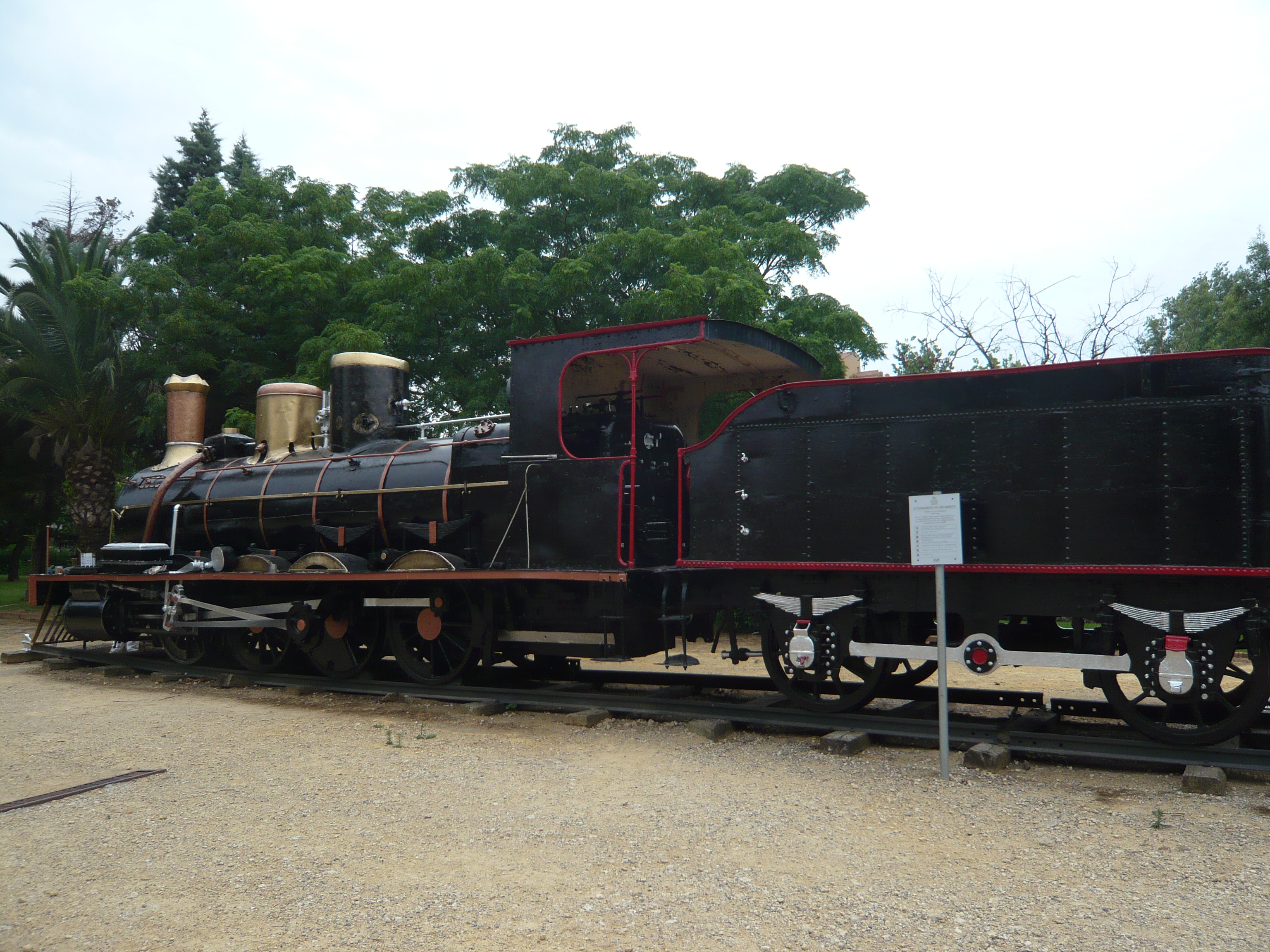 11370 Los Barrios, Cádiz, Spain